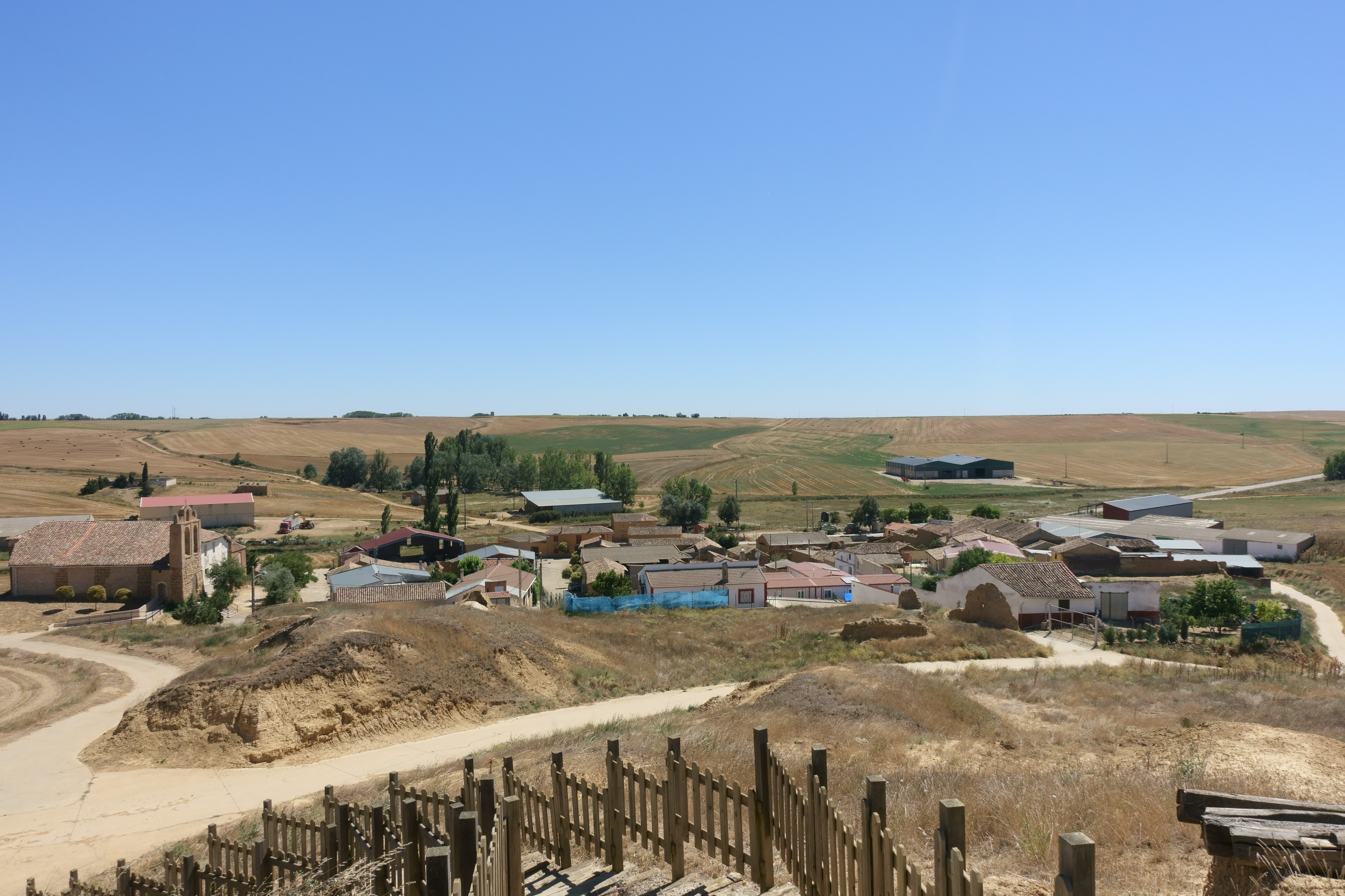 Vista general de Villanueva de la Condesa (Valladolid, España).